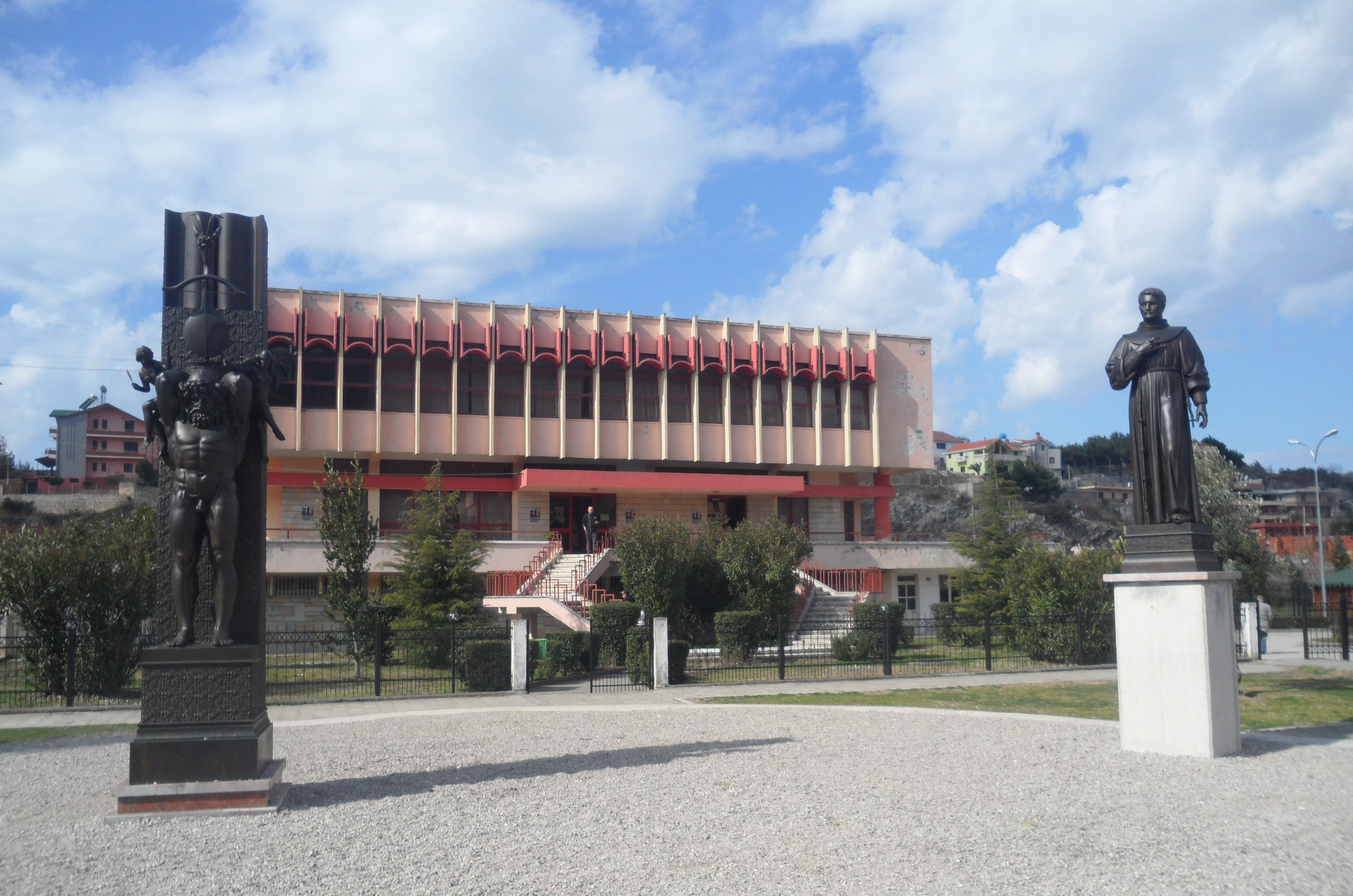 Biblioteka Lezhë | Bibliotekat Publike